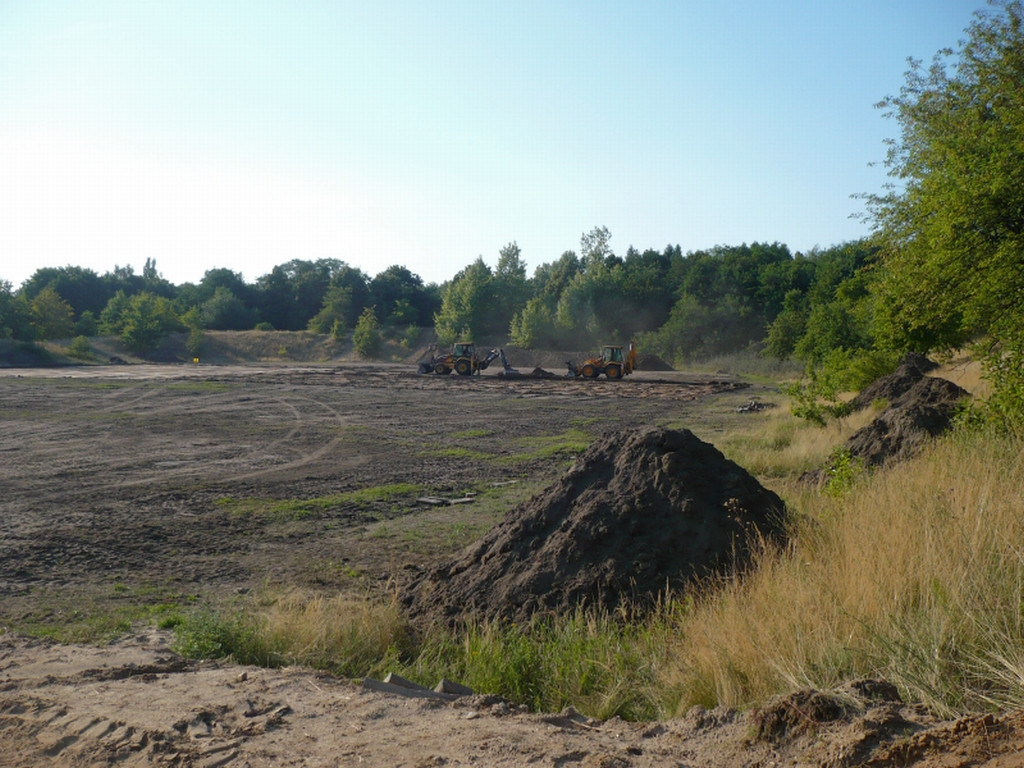 Budowa stadionu wielofunkcyjnego w Łodzi, na Stokach.